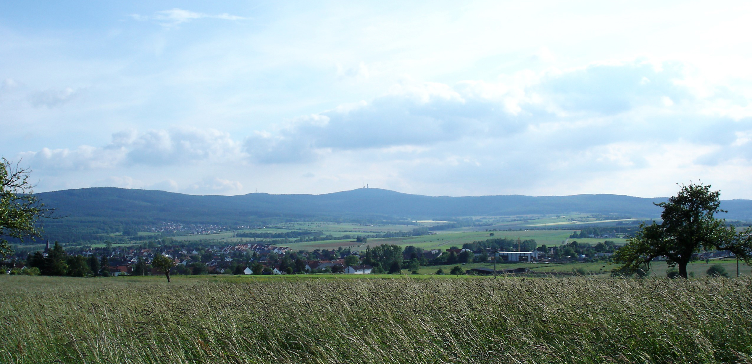 Feldbergblick von Wehrheim (Hintertaunus)